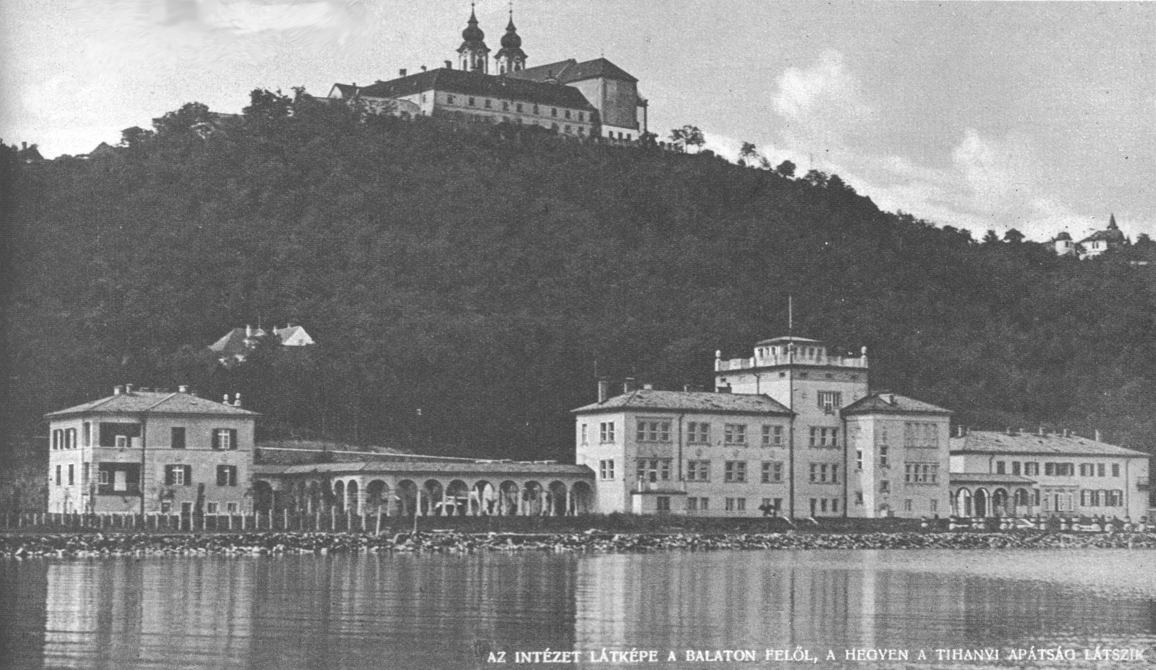 Az 1927-ben alapított Tihanyi Biológiai Intézet.